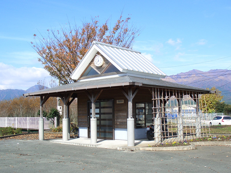 南阿蘇鉄道 見晴台駅 撮影者/著作者/著作権保有者 : MK Products (本人がアップロード) 撮影日 : 2006/11/21 見晴台駅用にアップロードした画像です。良い画像があれば別の画像に変えてください。